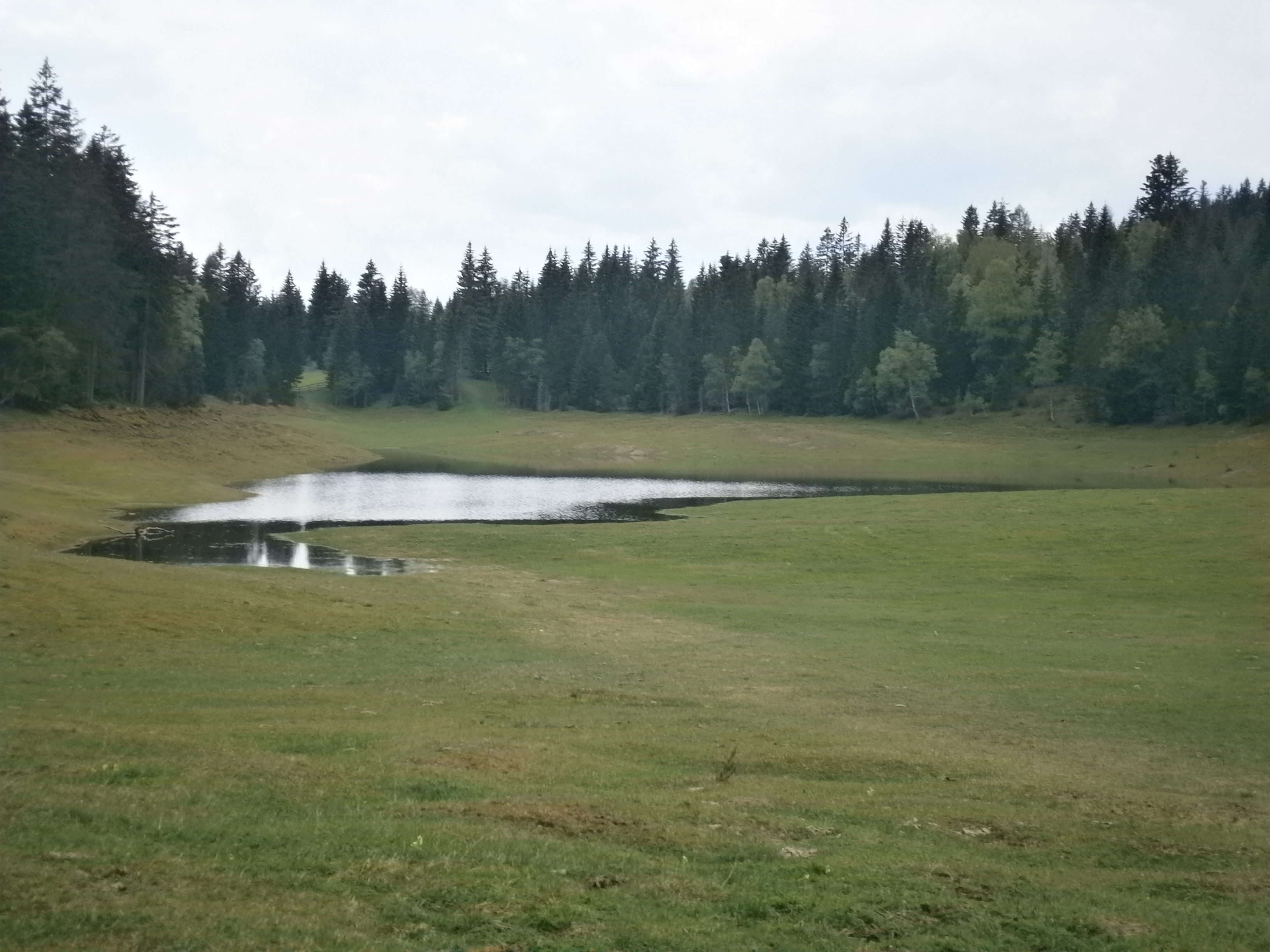 Wildmoossee am 28.05.2012